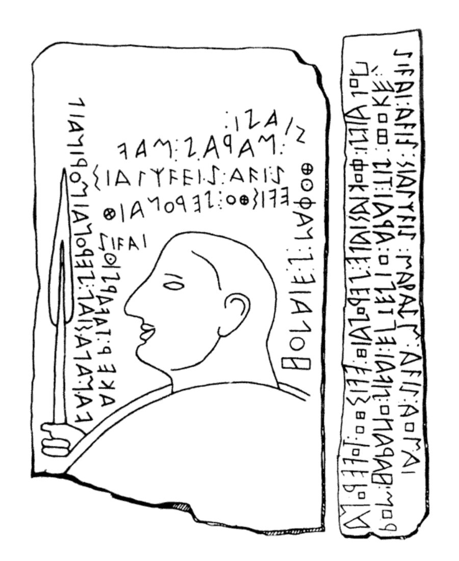 „Stele von Lemnos“. Grabstele aus dem Ort Kaminia auf der Insel Lemnos, heute im Archäologisches Nationalmuseum in Athen, Griechenland